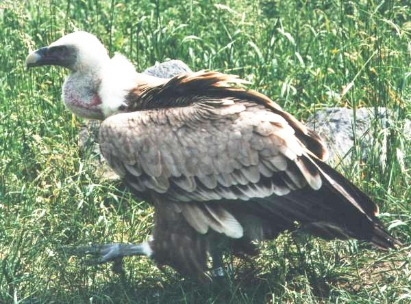 Tierpark Berlin - Gänsegeier (Gyps fulvus)